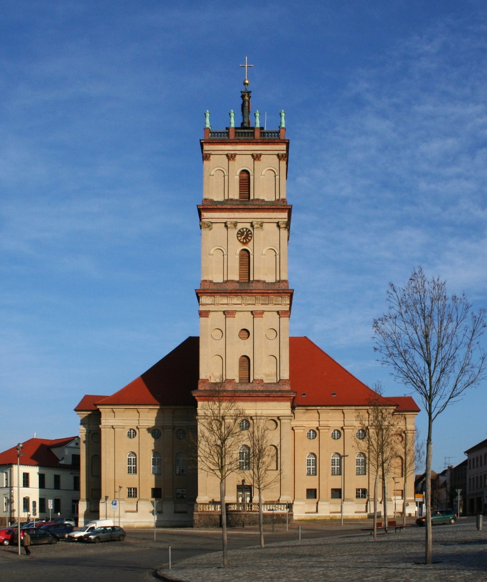 Front der Stadtkirche Neustrelitz